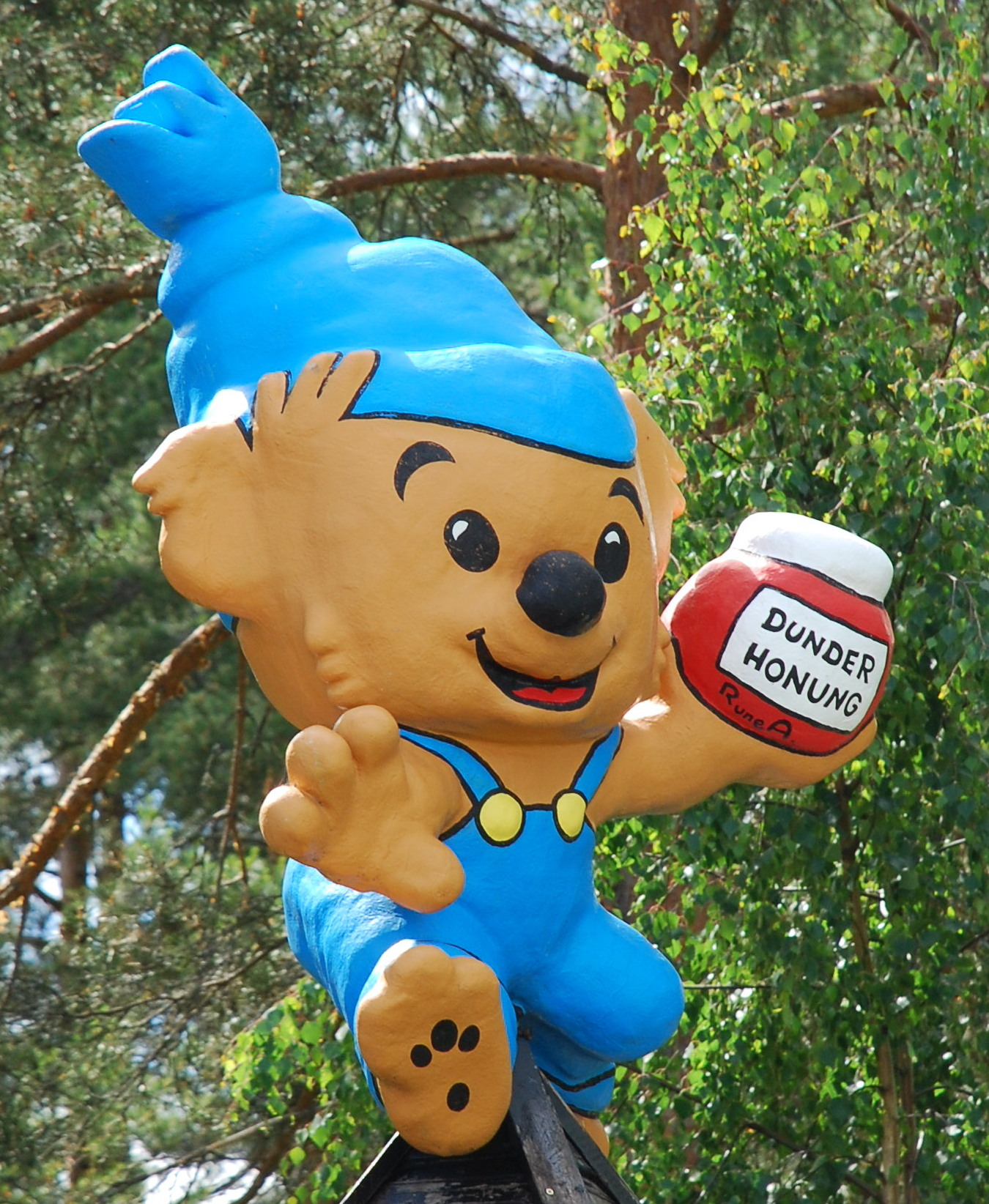 Bamse (på lekställning vid Stavsjö Klint, bredvid E4)